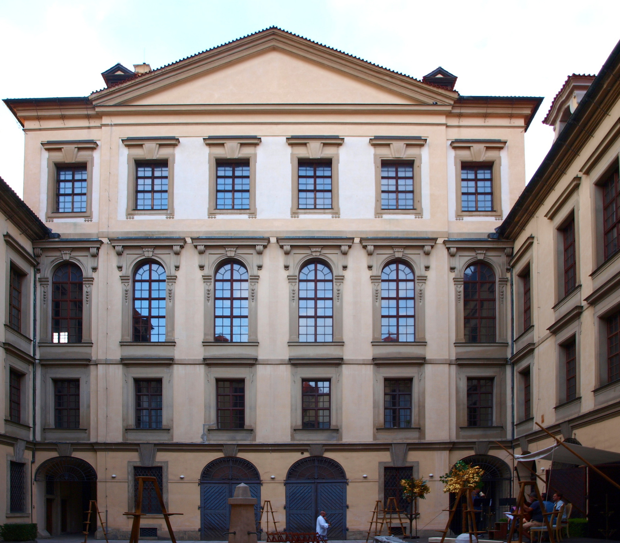 Praha 1-Staré Město, Clam-Gallasův palác